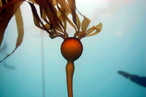 Kelp Nereocystis luetkeana